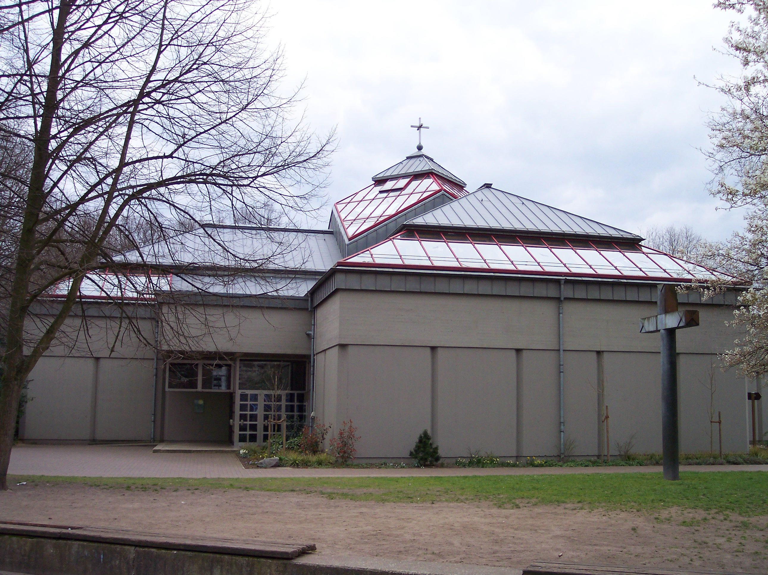 Dorsten Wulfen Barkenberk St. Barbara